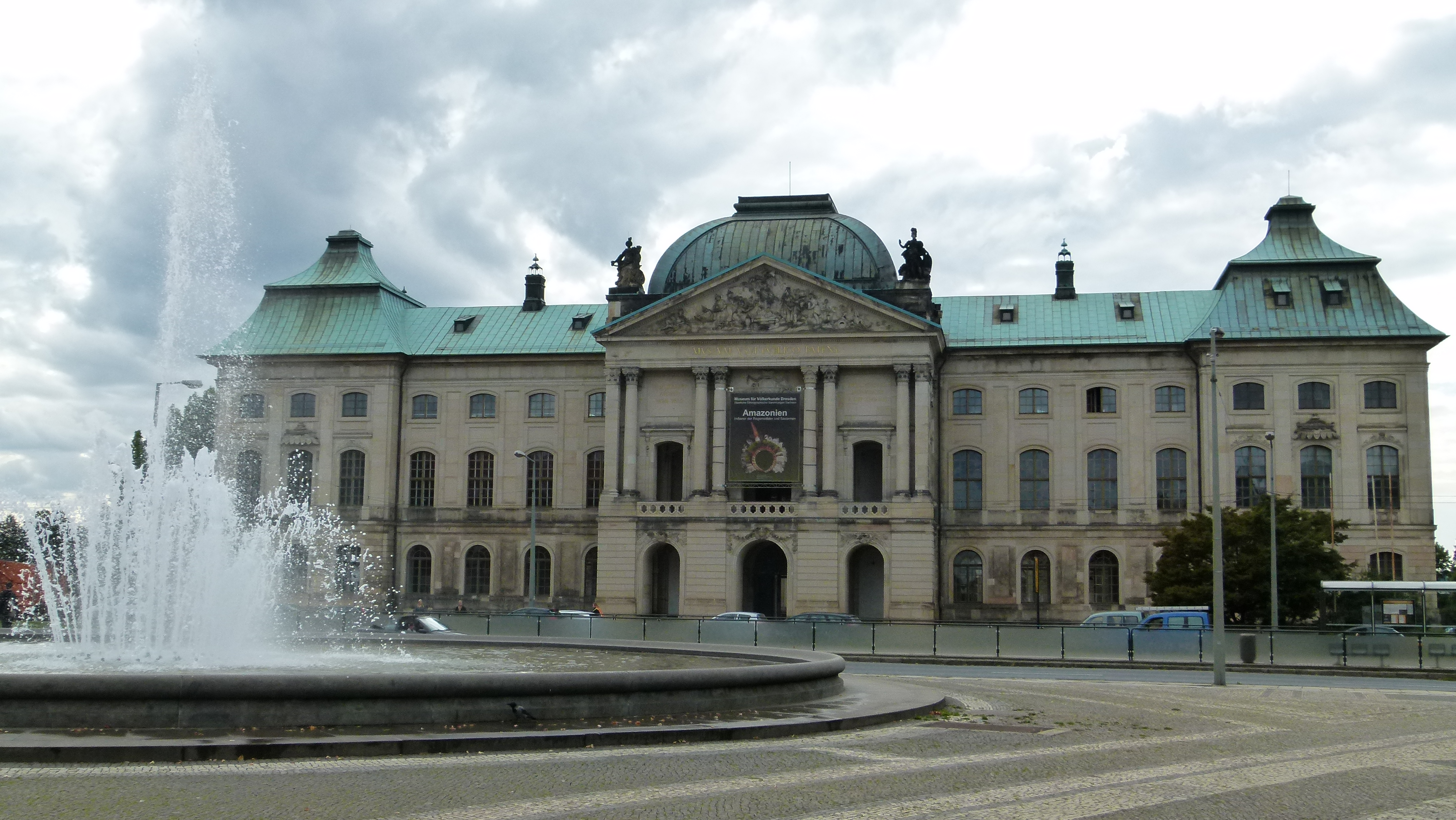 Japanisches Palais in Dresden